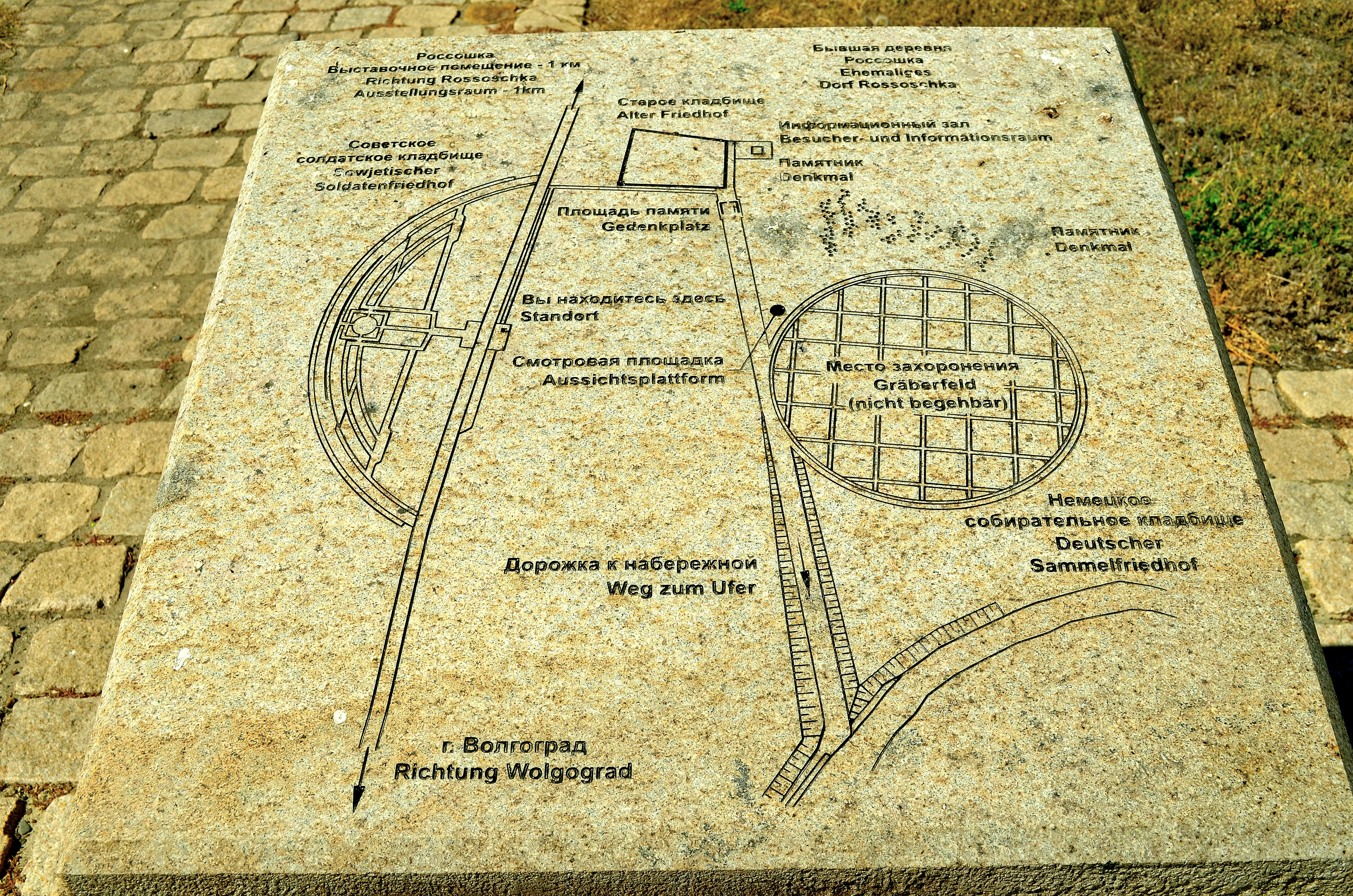 Россошки — военно-мемориальное кладбище, в 34 км на северо-запад от Волгограда в Городищенском районе.